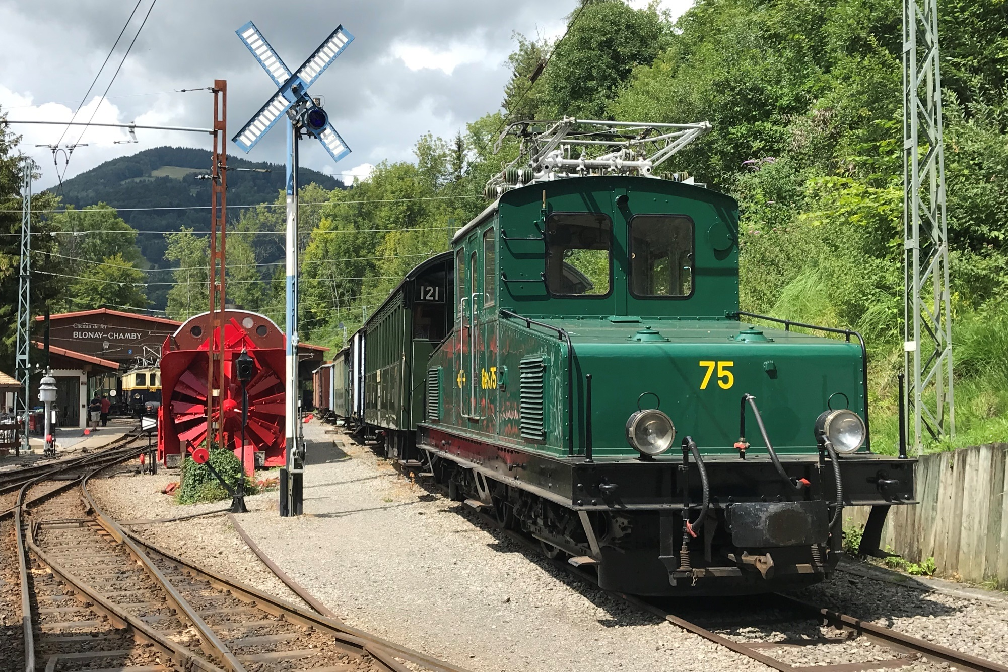 Ein Rangieren verboten zeigende Rangiersignale (Sagbock, Sägebock, Räumsignal). Dampfschneeschleuder R 1052 der ehemaligen Berninabahn (BB). Ein Rangieren verboten zeigende Rangiersignale (Sagbock, Sägebock, Räumsignal). Lokomotive Ge 4/4 75 der ehemaligen Georg Fischer Werkbahn in Schaffhausen.